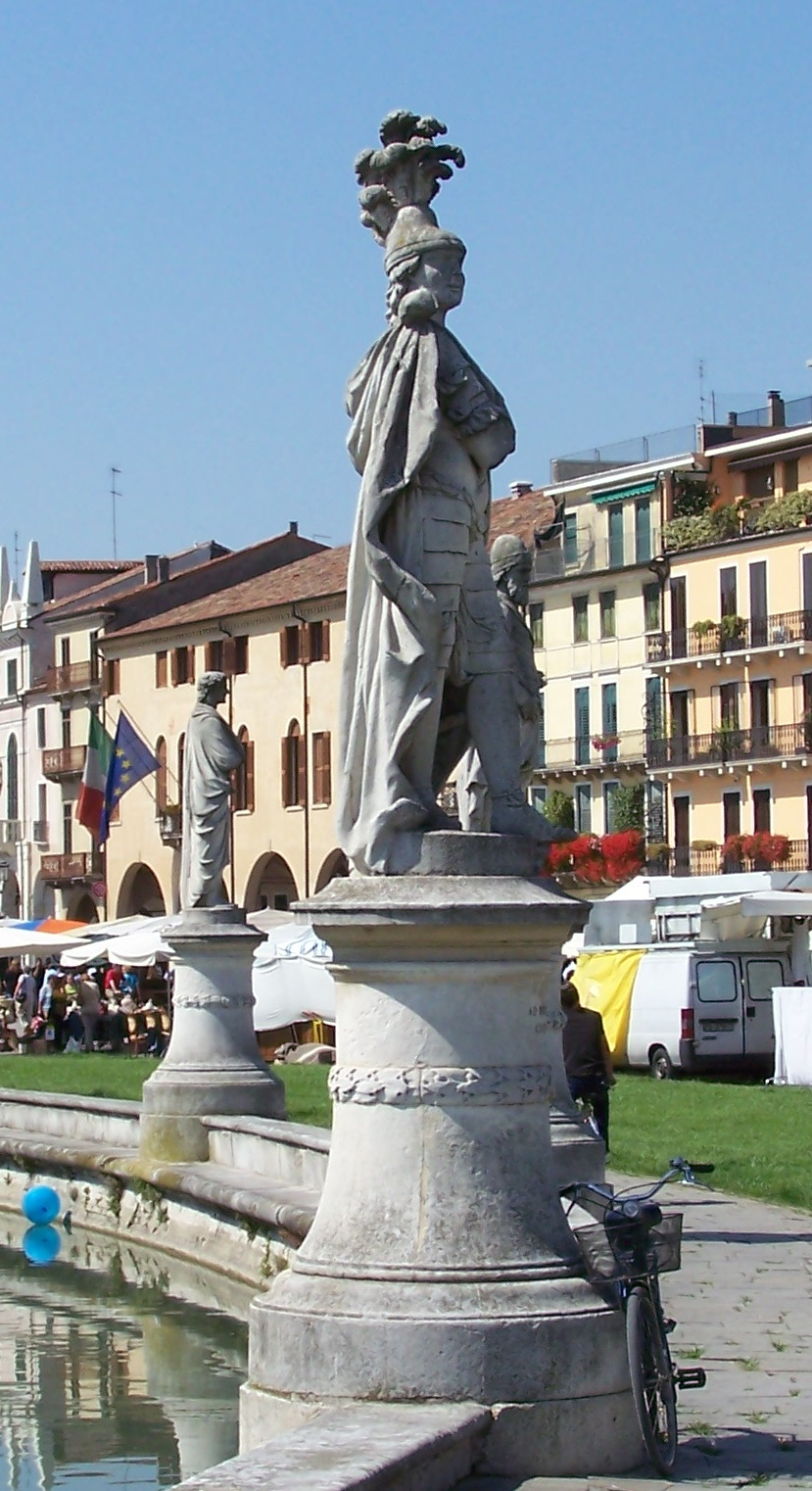 Antenor Padova - Prato della Valle